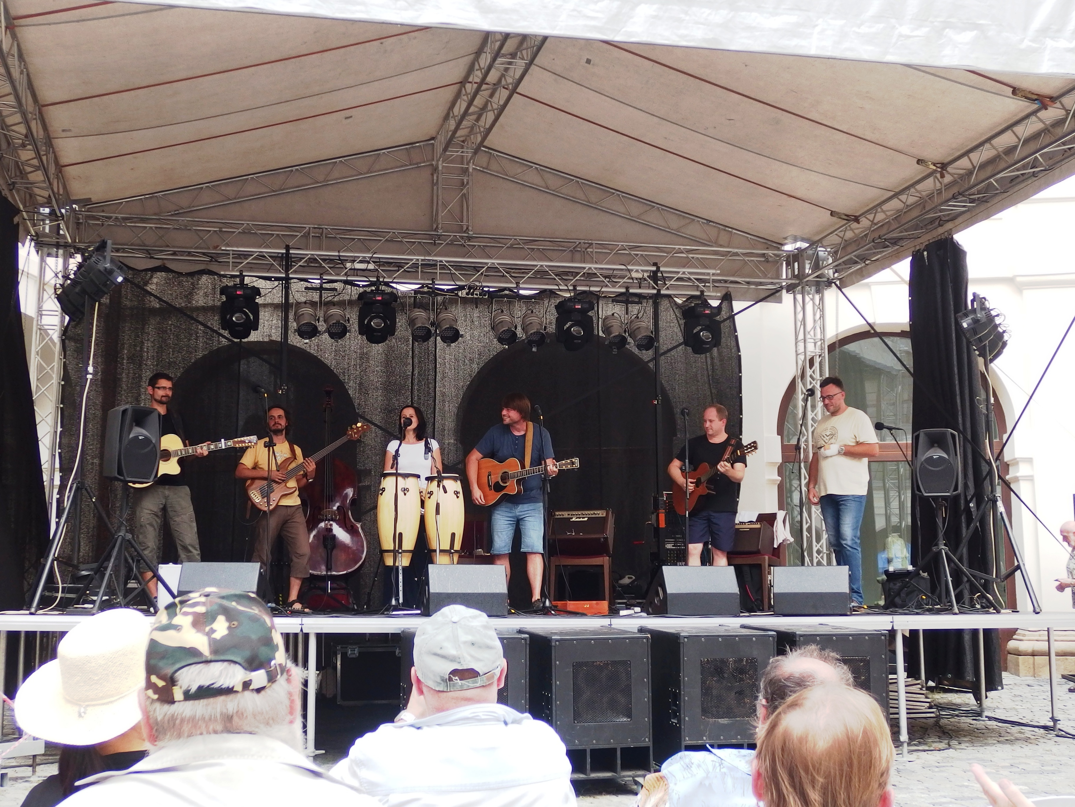 Marien, folková skupina z Pardubic (v Holešově 2017).